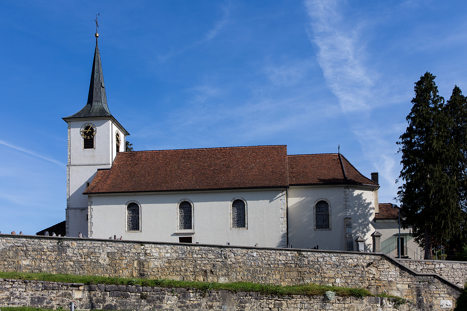 Kirche Sankt Imier in Develier (JU)